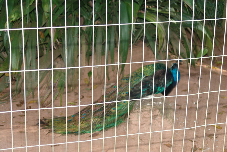 Zoológico do município de Bauru, estado de São Paulo, Brasil.